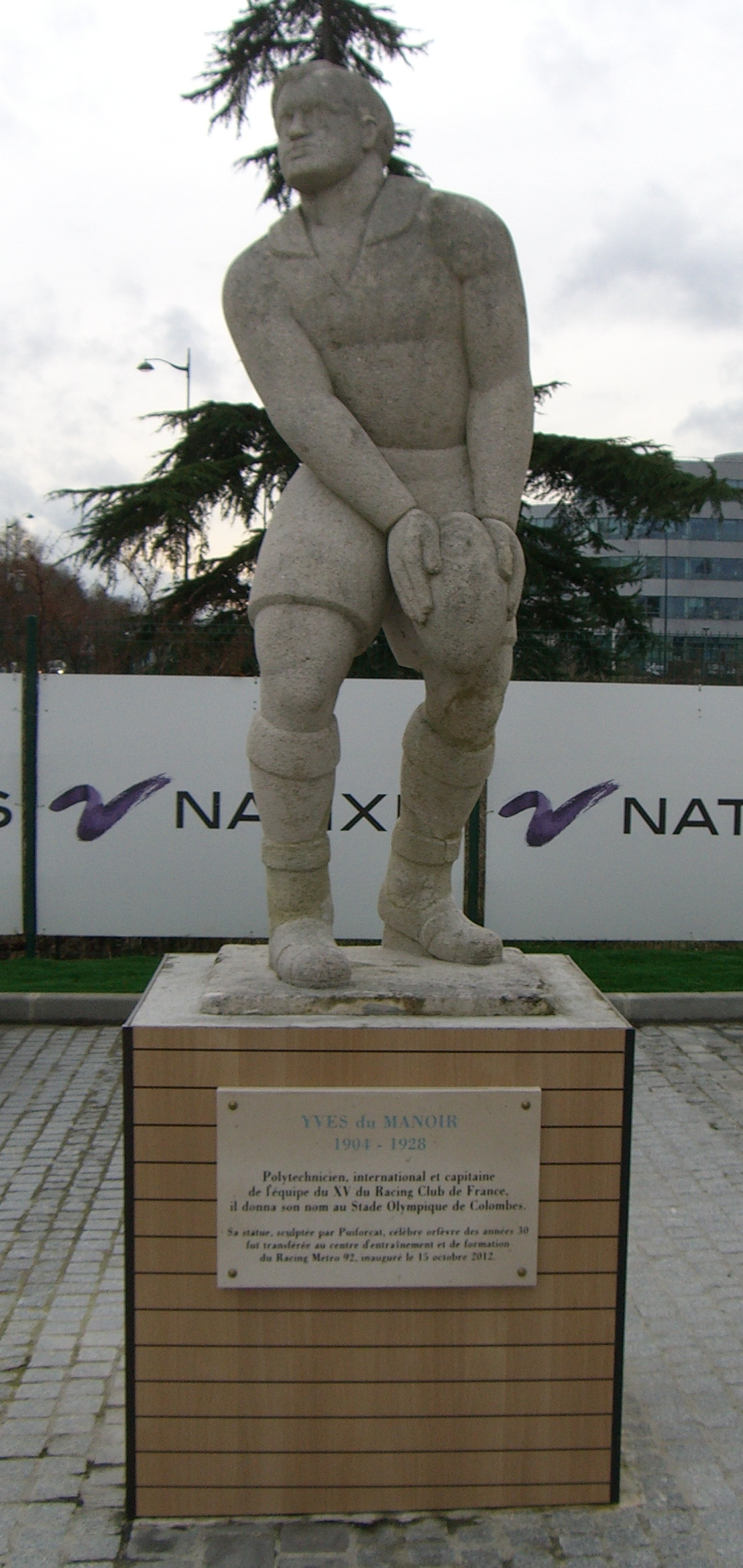 Statue Yves du Manoir au Centre de formation du Racing Métro 92 Rugby au parc des sports de Plessis Robinson